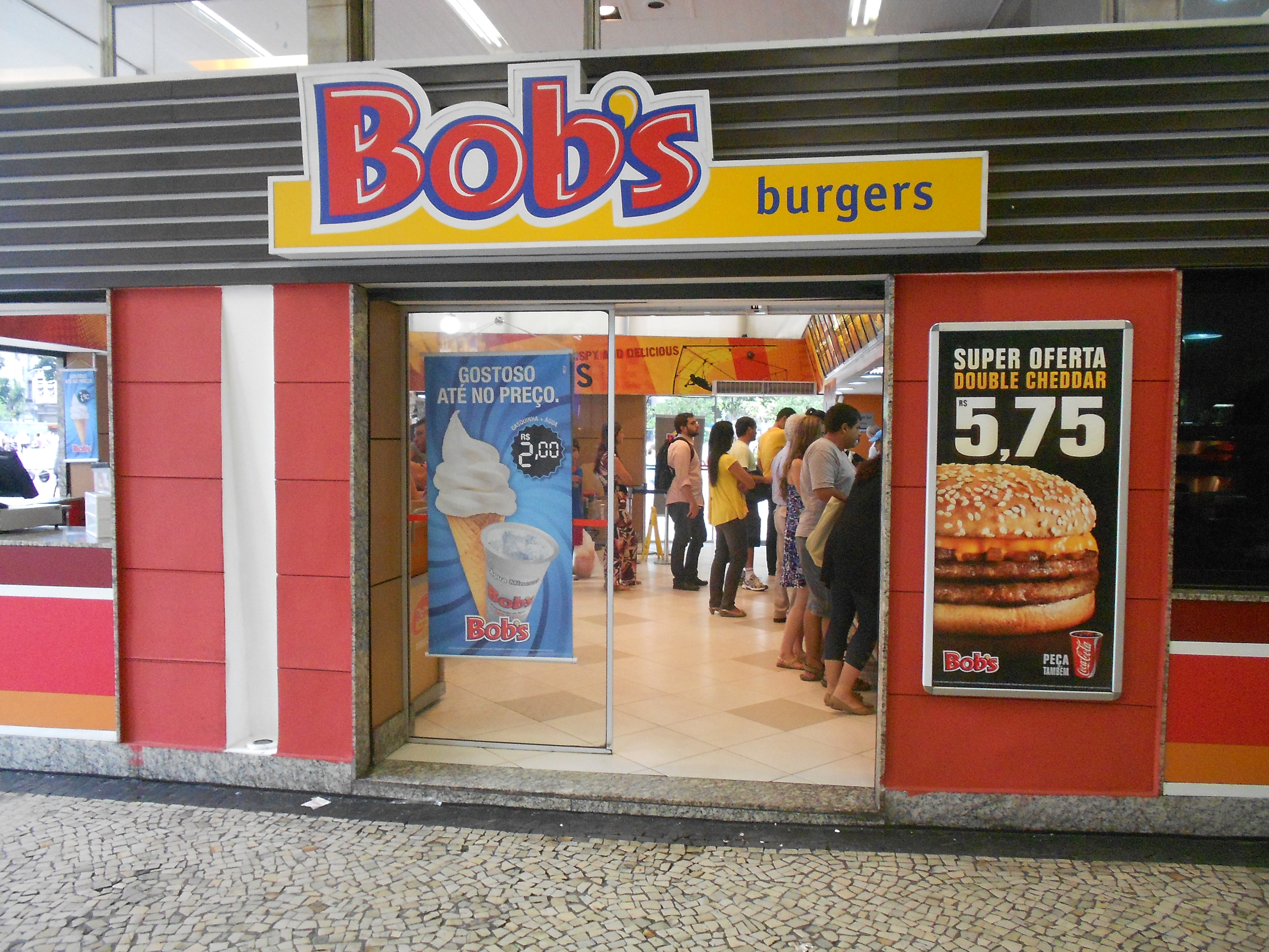 Bob's, situado no Shopping Avenida Central e Largo da Carioca, Centro do Rio de Janeiro, Brasil.